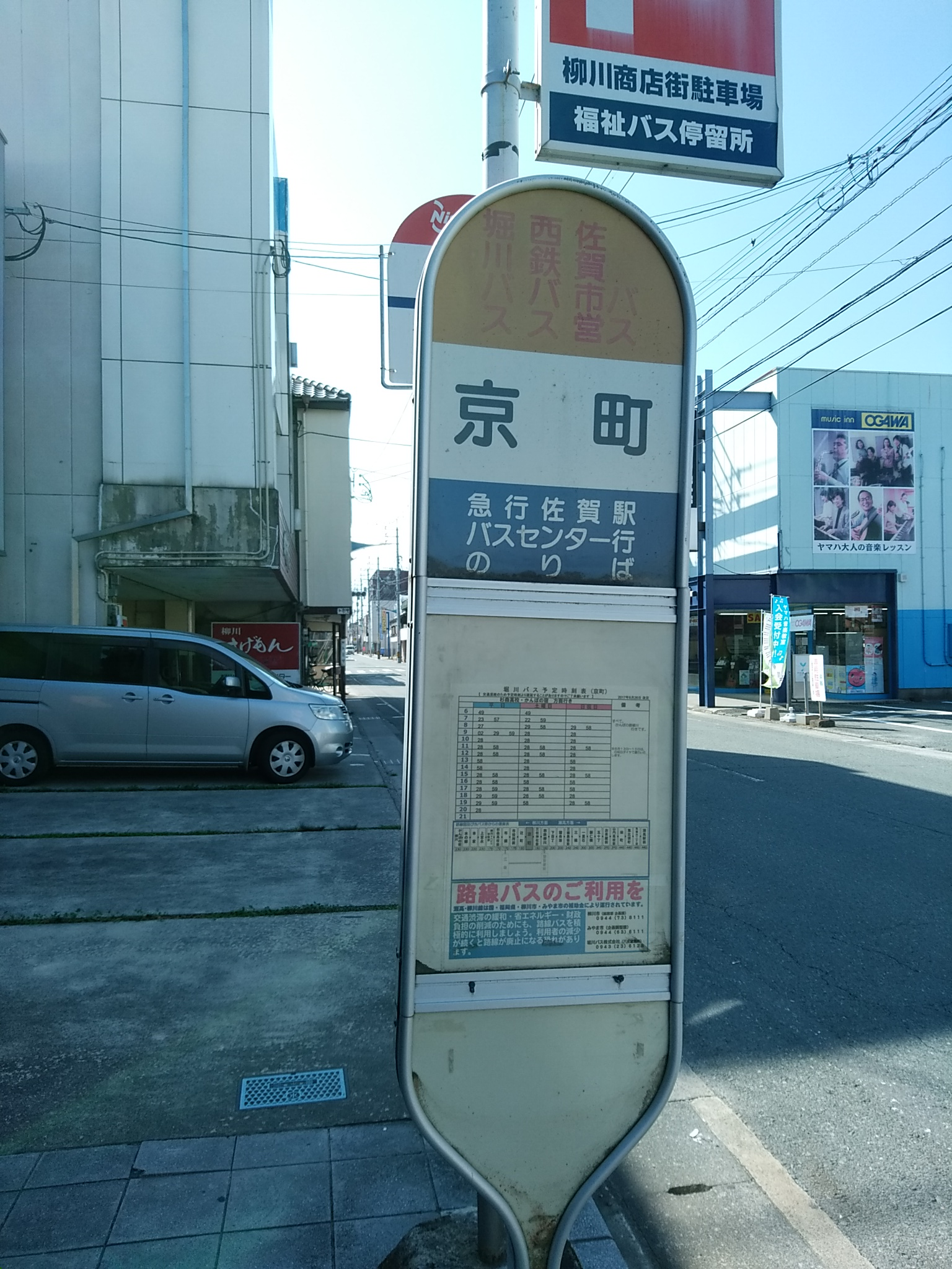 柳川市京町バス停